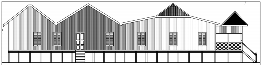 Rumah Potong Limas.